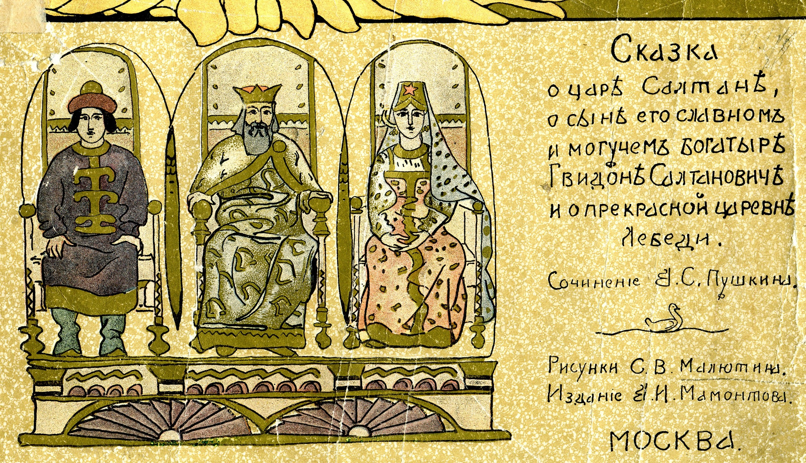 Сказка о царе Салтане. 1899. Рисунки С.В. Малютина. Издание А.И. Мамонтова